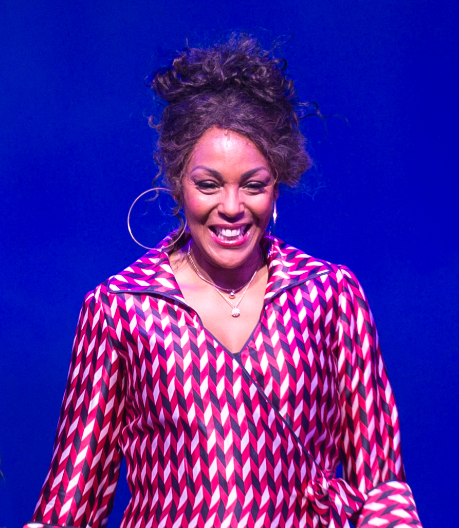 Kayo Shekoni i musikalen "Häxorna i Eastwick" på Cirkus i Stockholm 2019. Med Peter Jöback, Linda Olsson, Kayo Shekoni, Vanna Rosenberg, Sussie Eriksson, Jan Mybrand med flera.